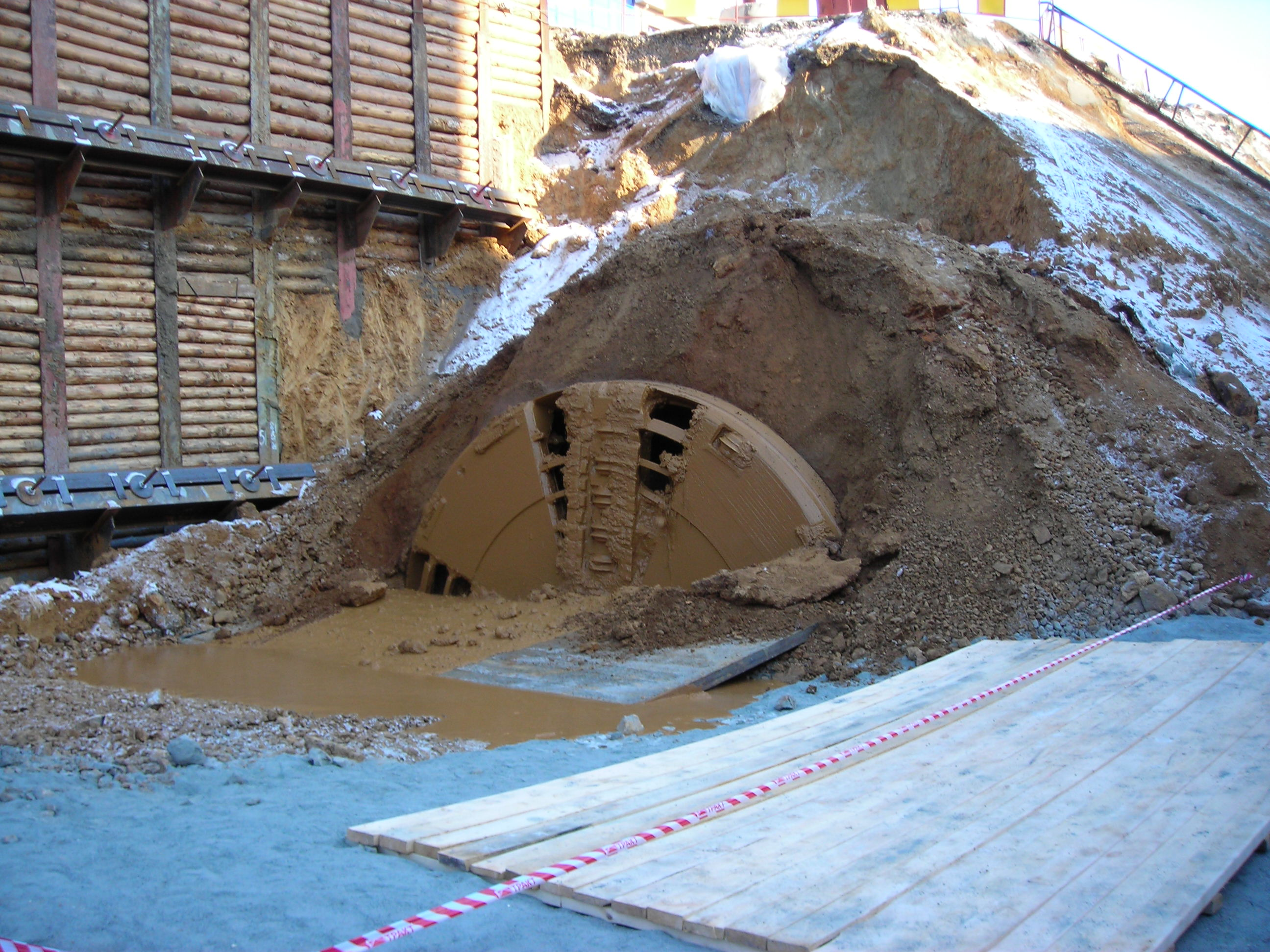 Тоннелепроходческий комплекс «Lovat» выходит в камеру модернизации при строительстве Челябинского метрополитена.